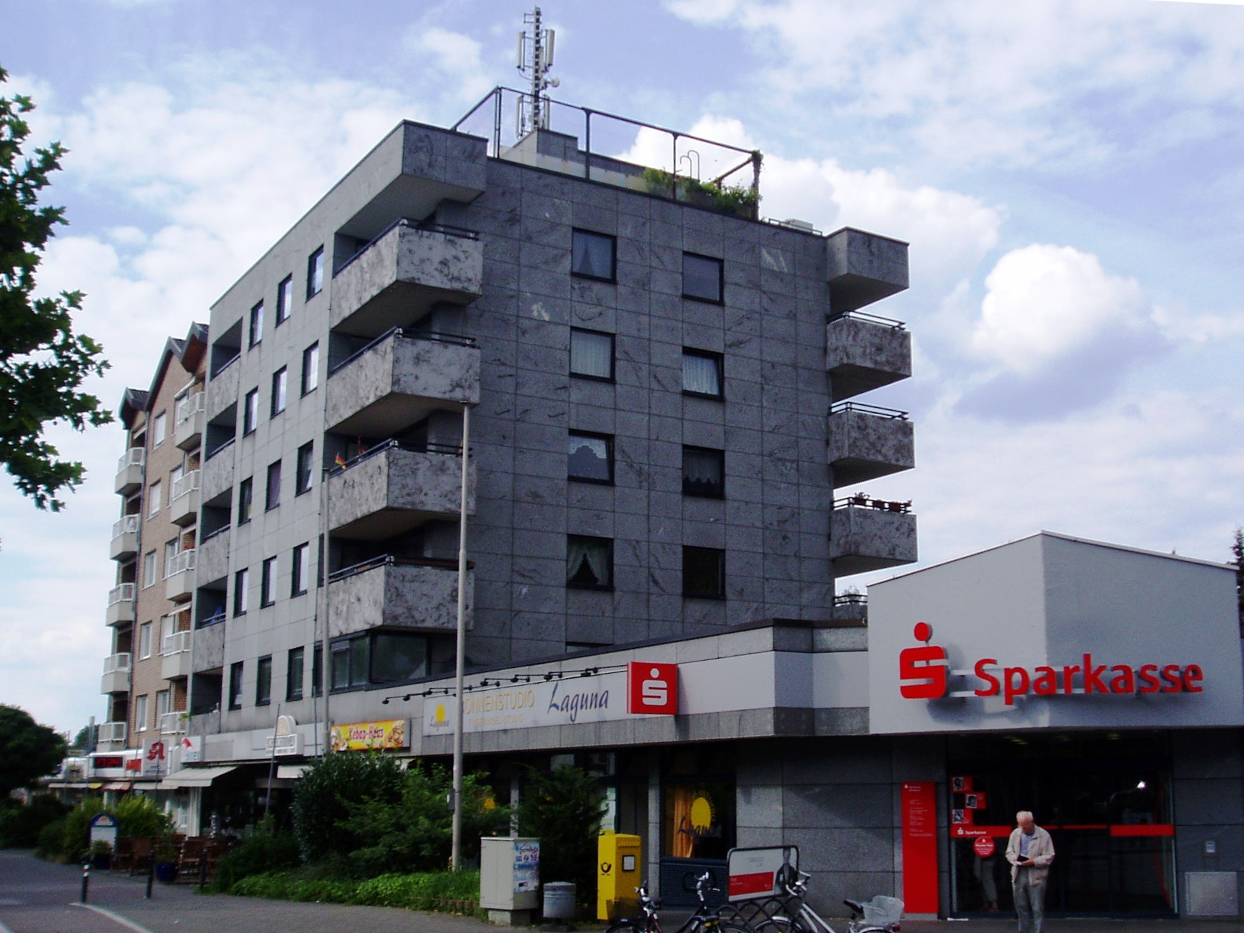 Ladenstraße an der Sparkasse KölnBonn in Köln-Ostheim